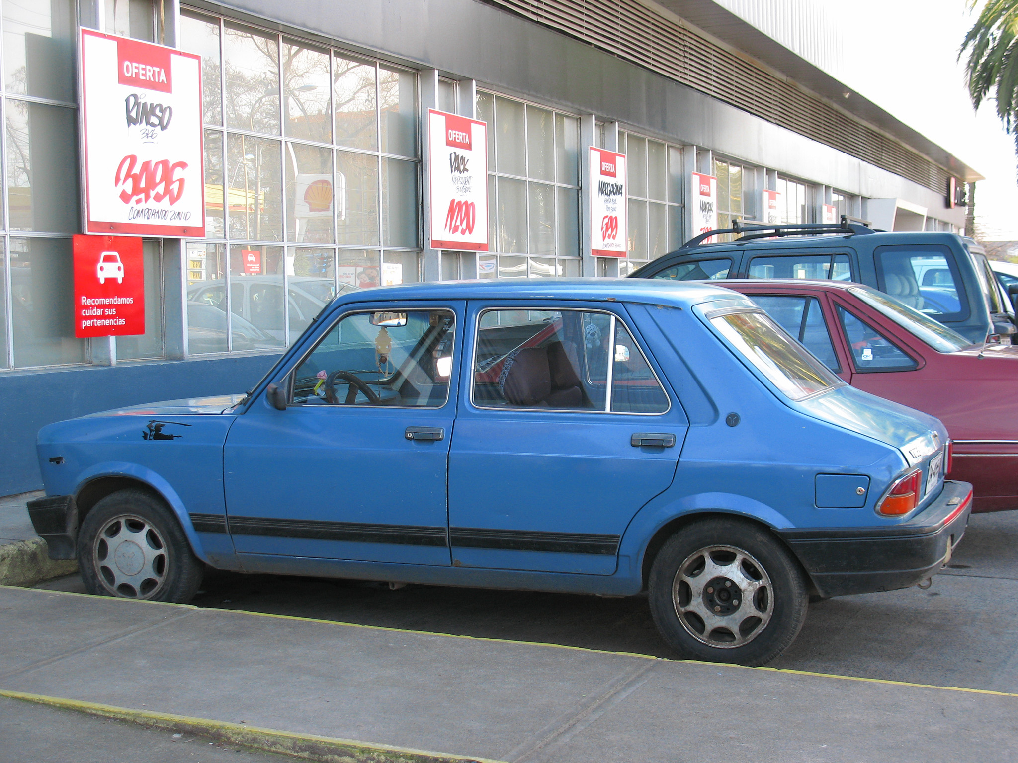 Yugo Skala 1990